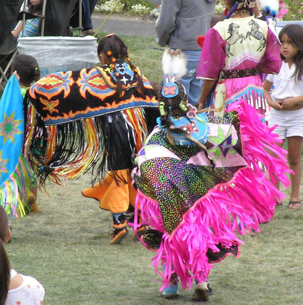 Two young girls in fancy dance pow wow regalia, Spokane Pow wow, 2007